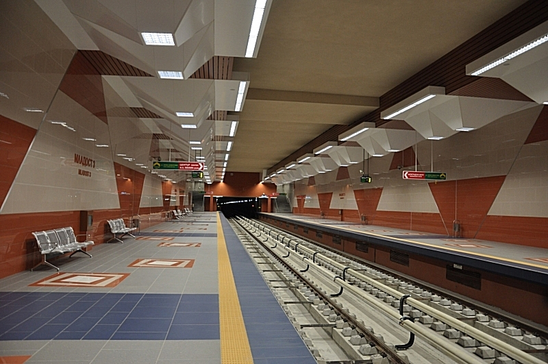 Метростанция Младост 3